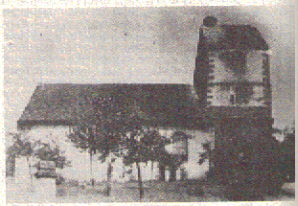 eglise schwindratzheim